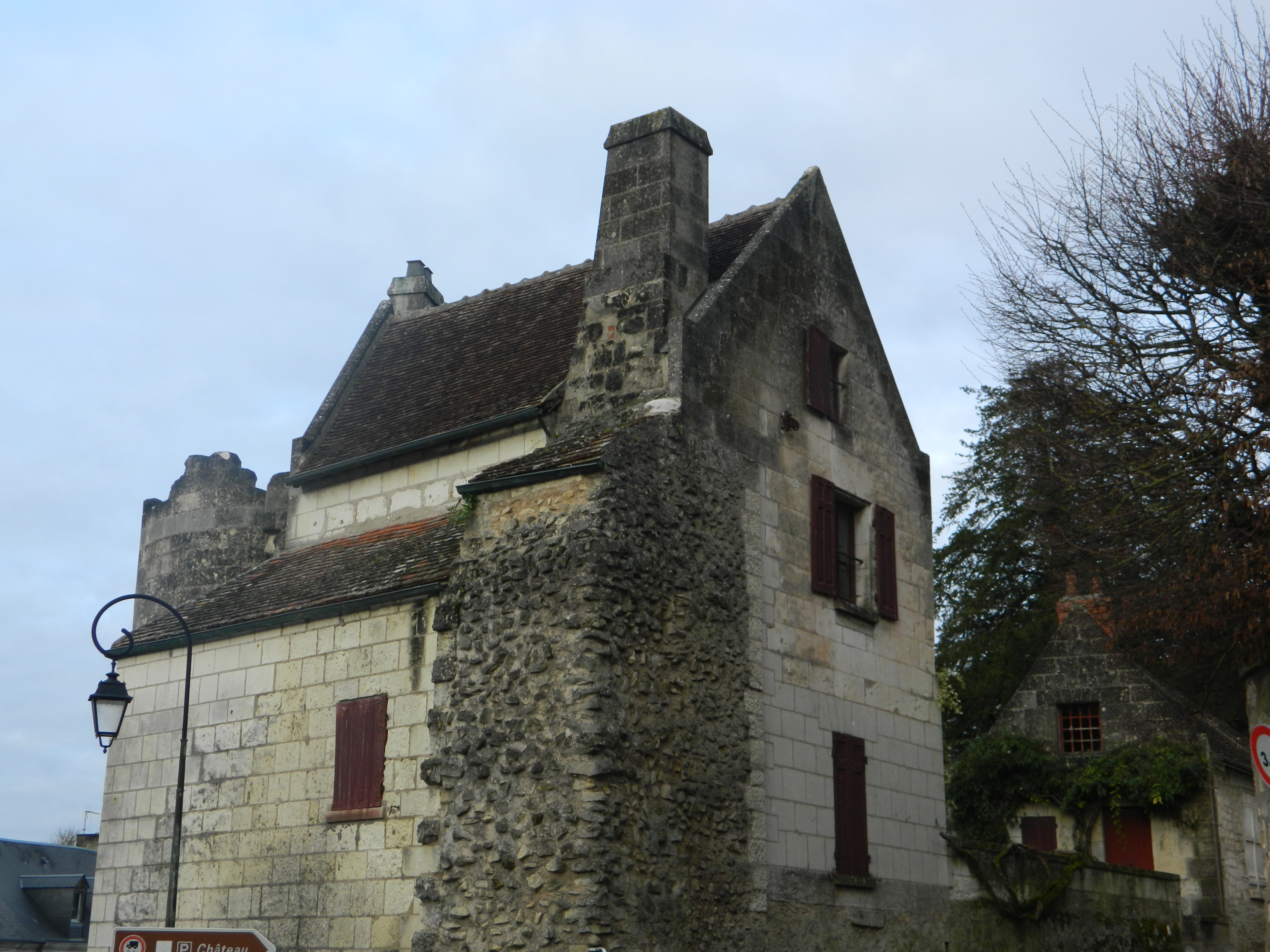 Porte Poitevine et la tour d'enceinte, ou Maillet, Monument historique de Loches .